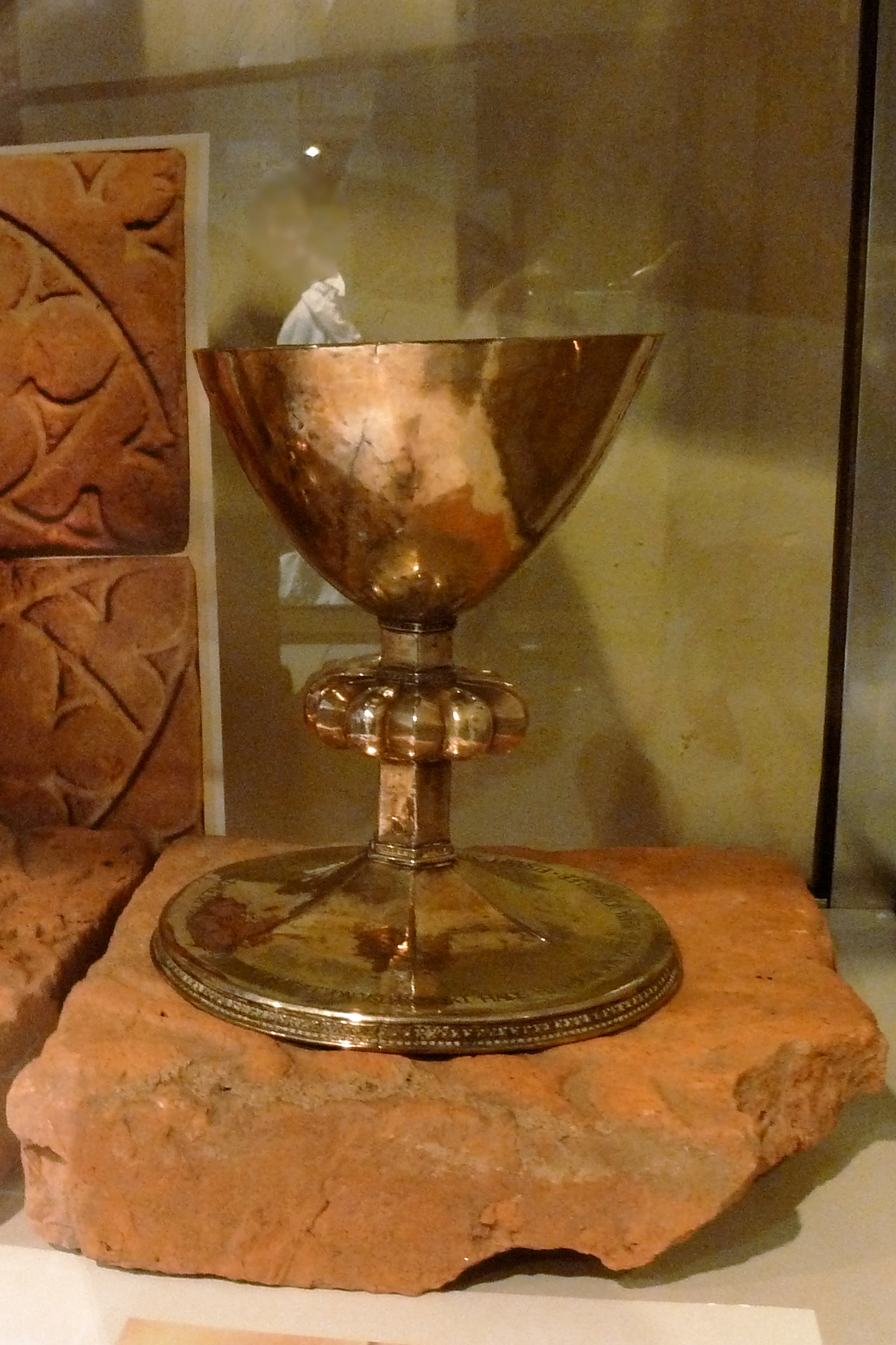 Ausstellung im Rahmen der 1000-Jahr-Feier der ehemaligen Klosterkirche in Reinhausen, Gemeinde Gleichen, Südniedersachen: Abendmahlskelch aus der Kirche . Datiert auf die Zeit zwischen 1578 und 1584. Silber. Der Kelch steht auf einer gotischen Maßwerk-Bodenfliese, die ebenfalls aus Reinhausen stammt.